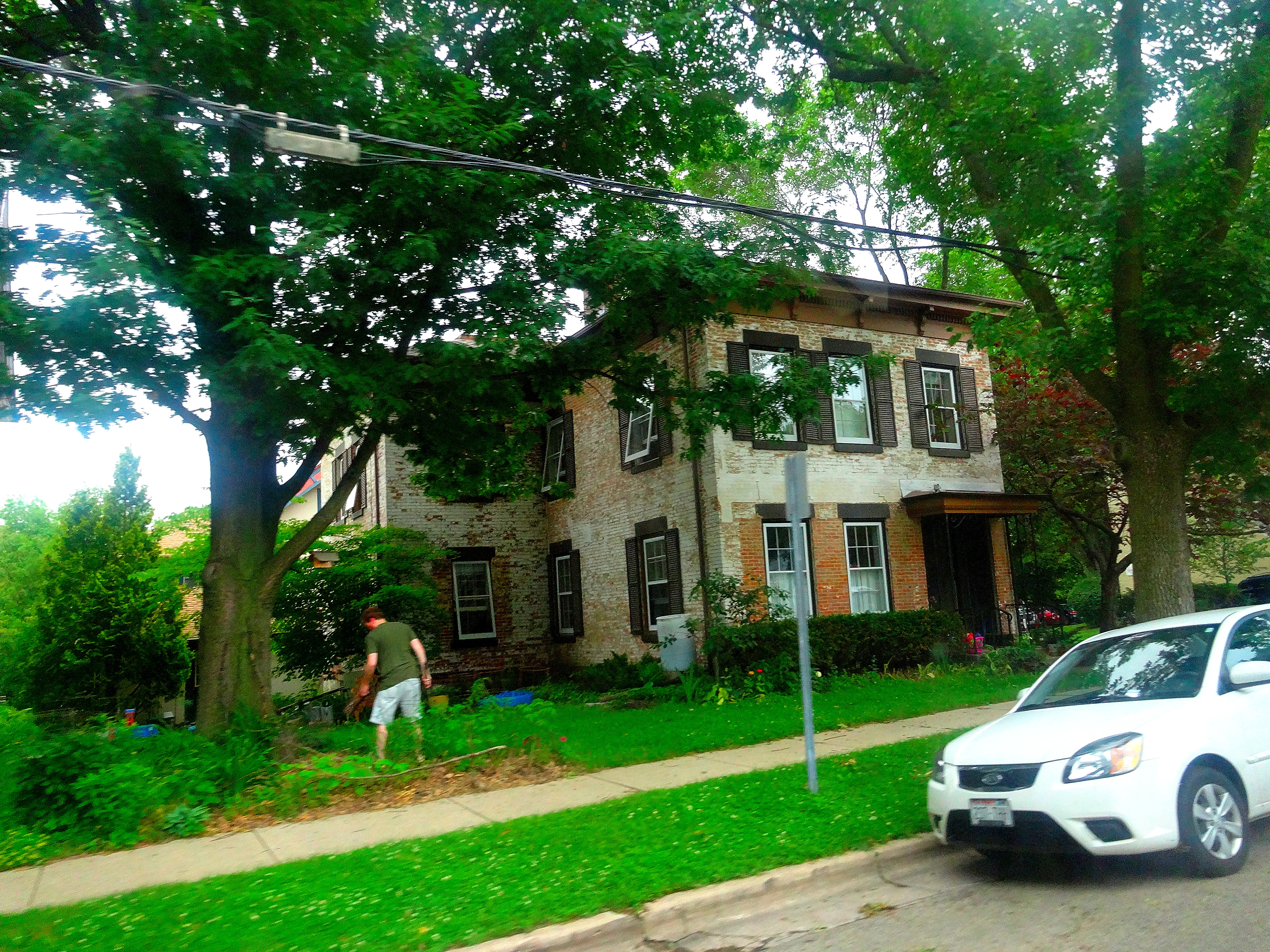 Hyer's Hotel